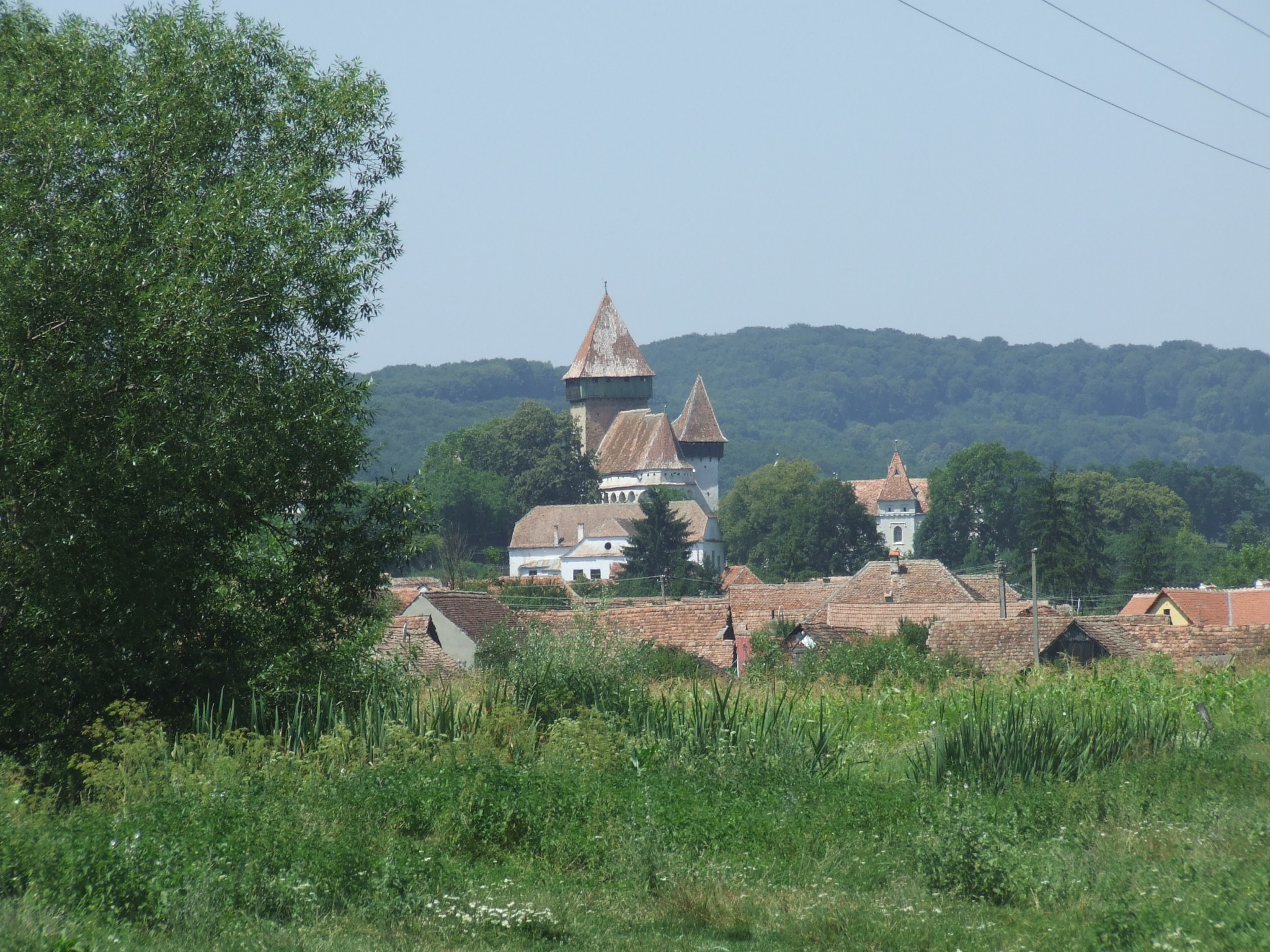 Incintă fortificată, cu turnuri, încăpere pentru provizii, turn de poartăși zwinger cu turn-casă a paznicului 02